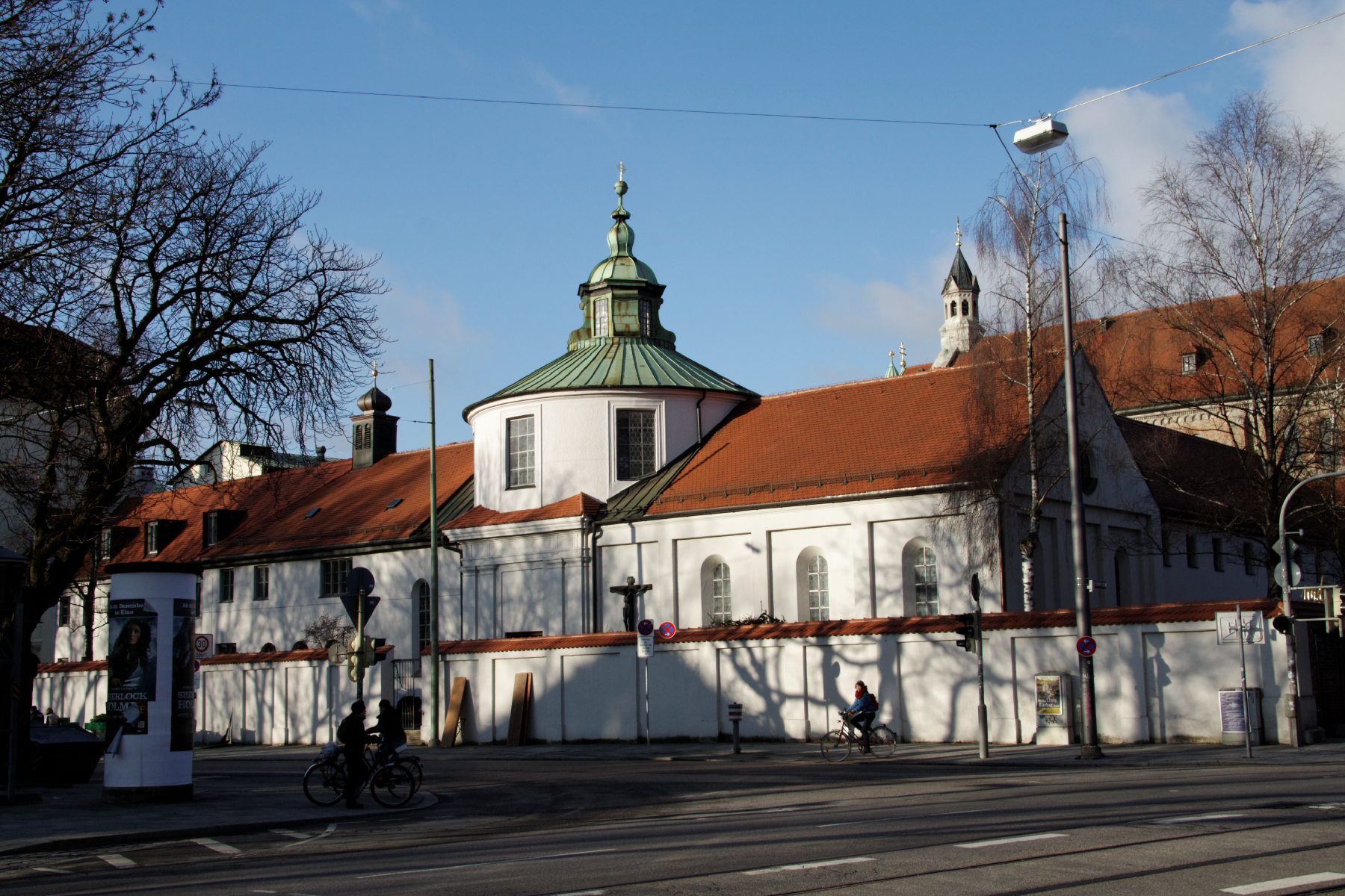 München, Schmerzhafte Kapelle